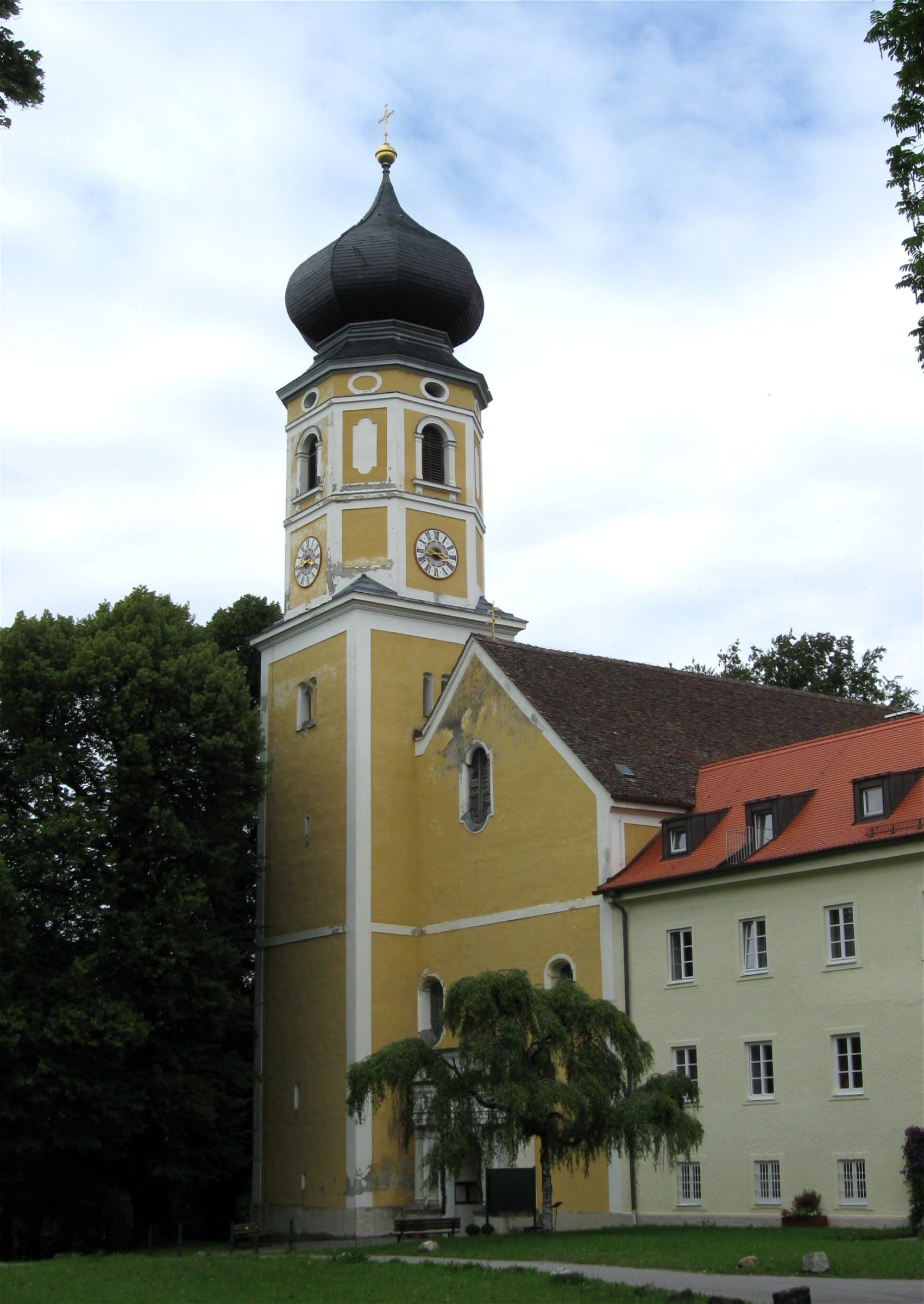 St. Martin, Bernried am Starnberger See